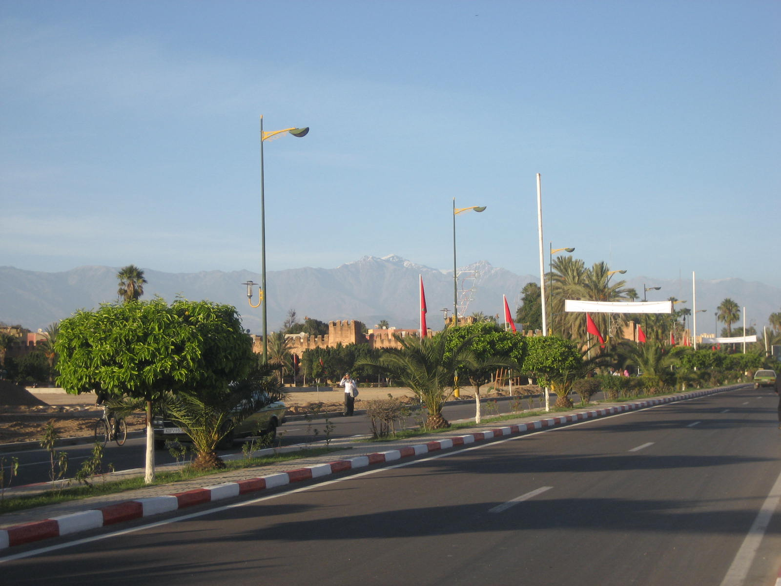 Vue sur les montagnes du Haut-Atlas